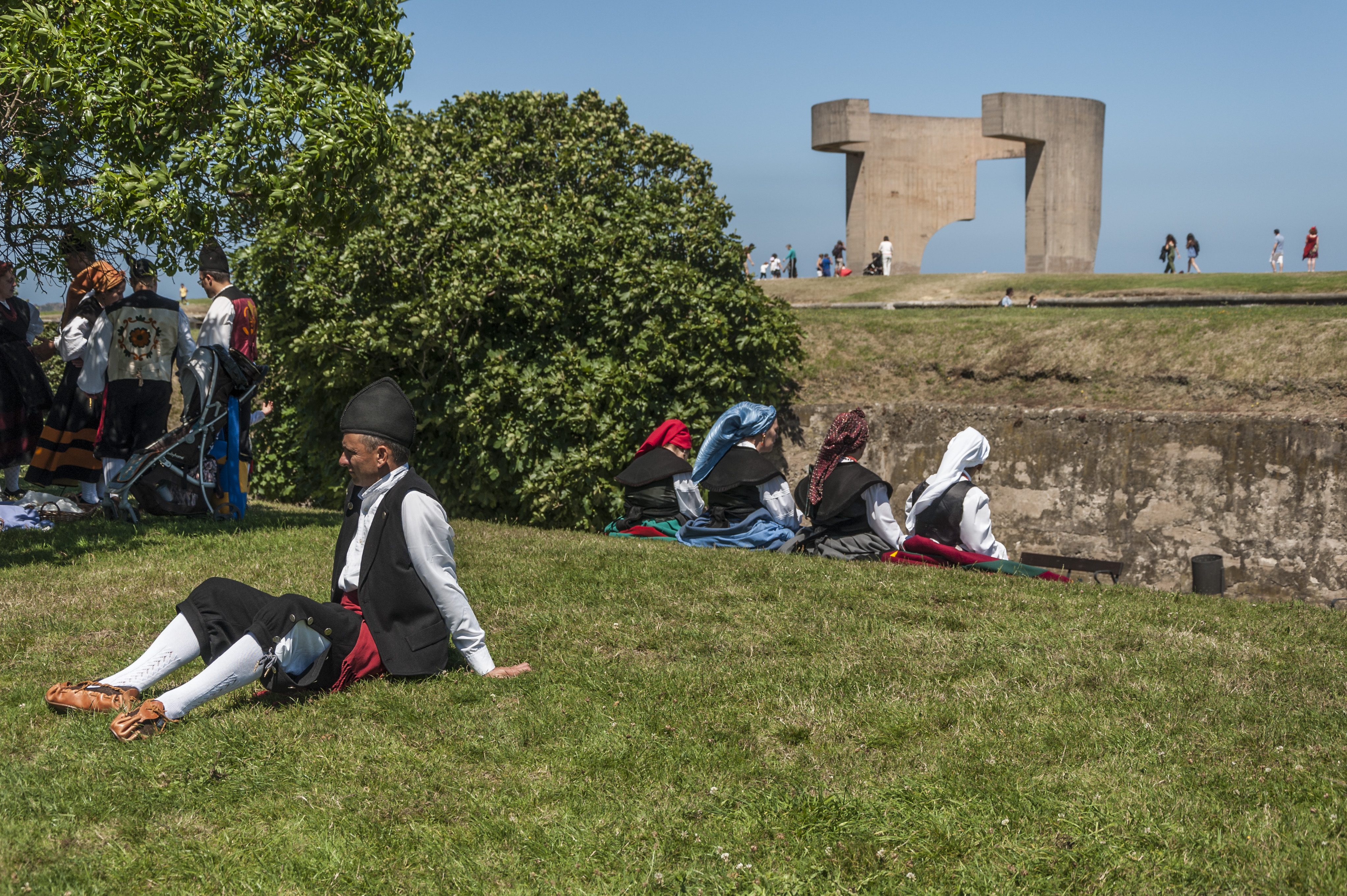 Tras el desfile, el baile, la "puxa del ramu" ....un descanso en el "prau" es bien merecido ...con la presencia monumental del "Elogio del horizonte"... This is a photography of a Folklore festival in Spain (Wikidata id Q8771143).